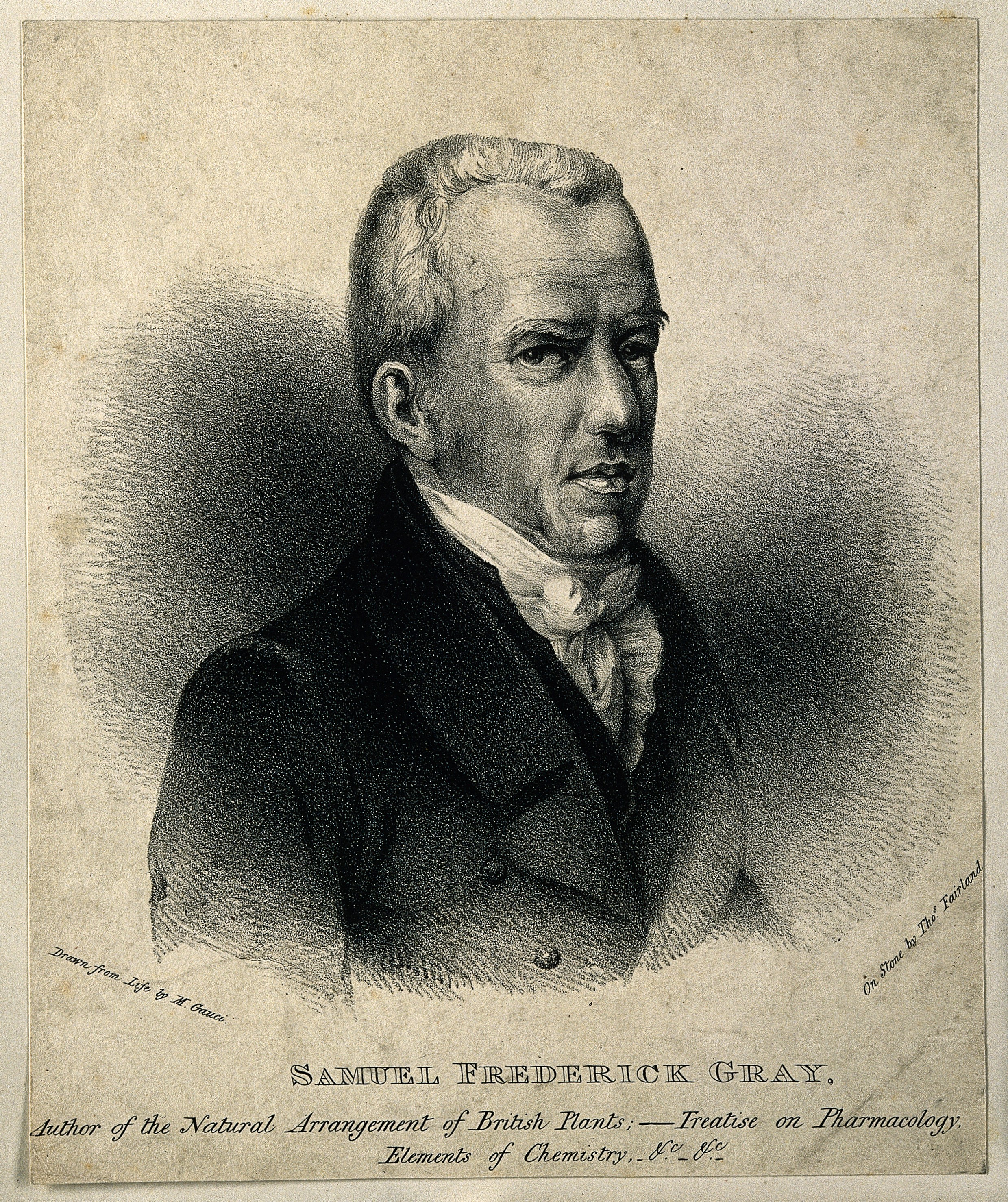 Genre/Technique: Portrait prints. Lithographs. Subject name: Gray, Samuel Frederick, fl. 1780-1836.